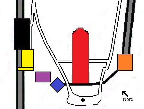 Plan de l'annexe sud-ouest du fort de Planoise, à Besançon (Doubs, France).